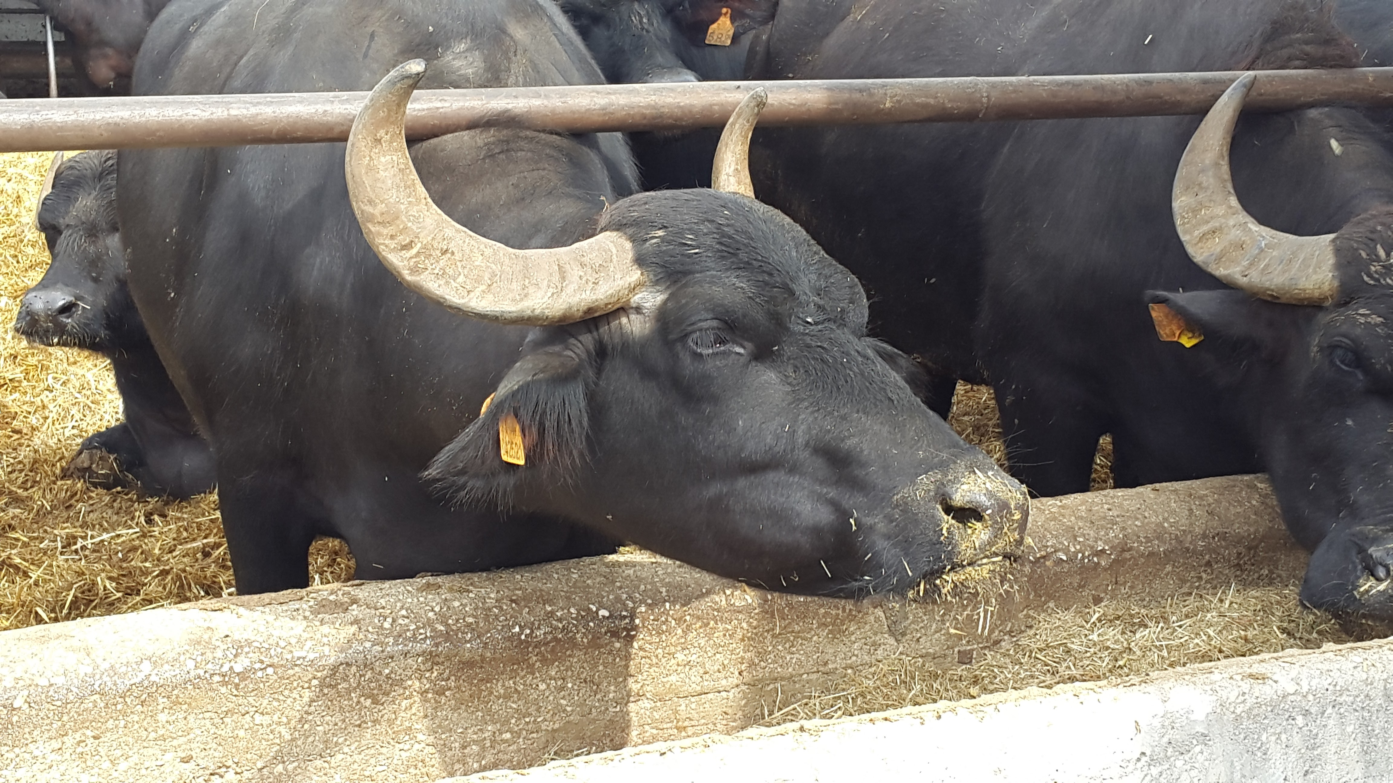 Bufala à mozzarella